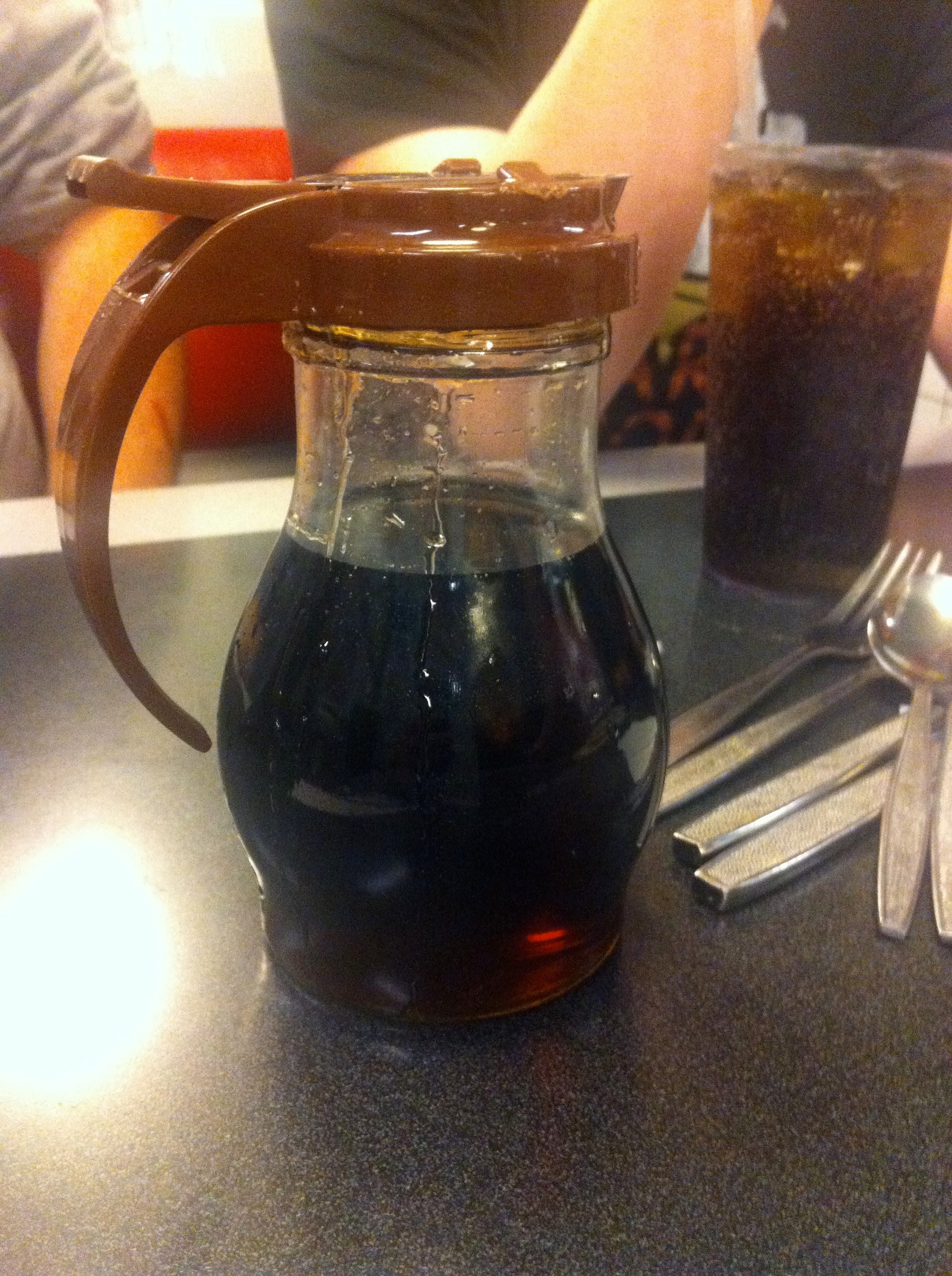 Syrup dispenser at Waffle House